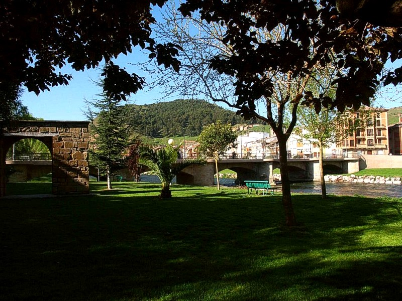 Date du cliché : septembre 2001.